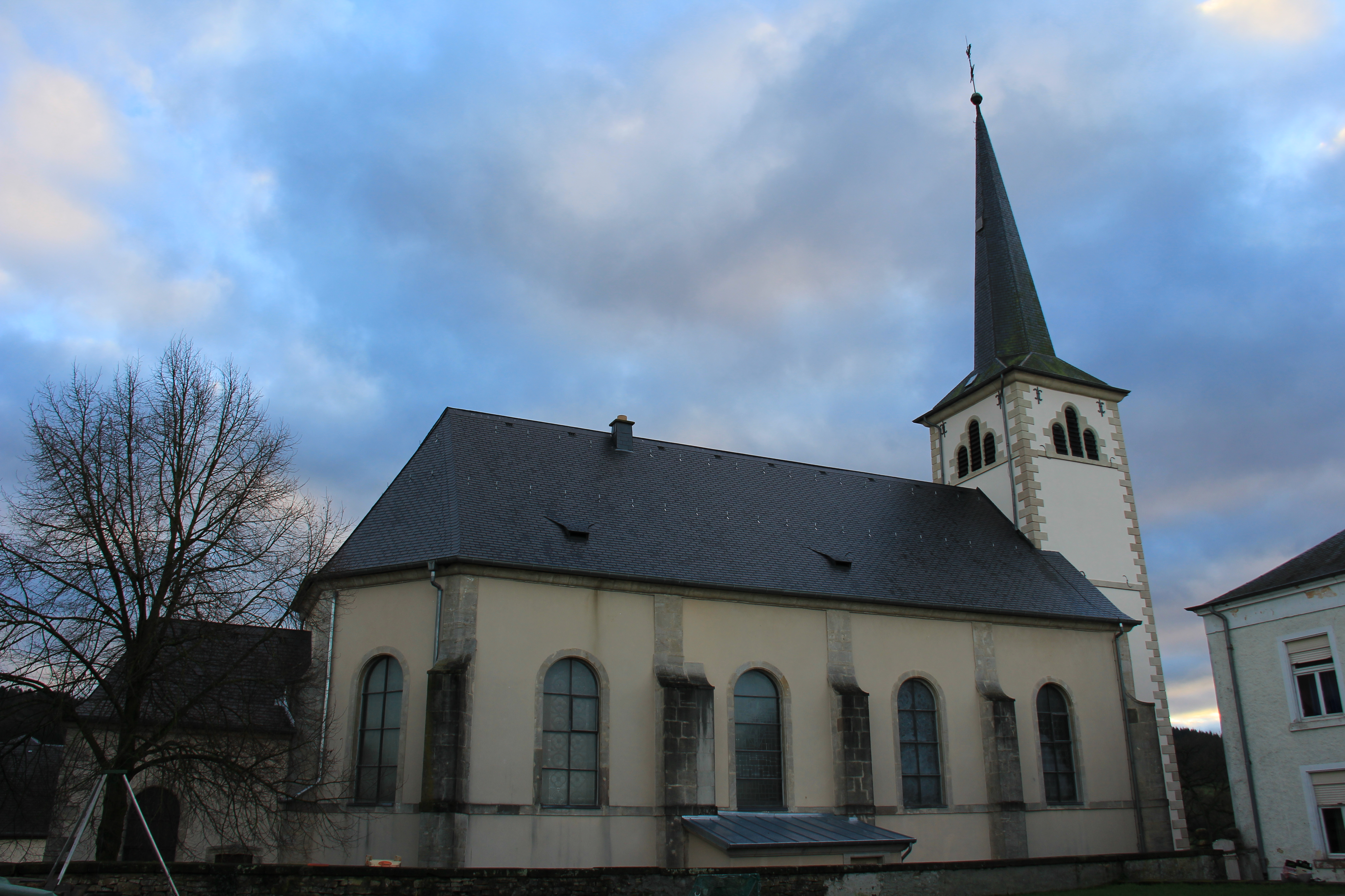 D'Nordsäit vun der Ielwener Parkierch (Gem. Biekerech). Am Vierdergrond lénks dat aalt Paschtoueschhaus.